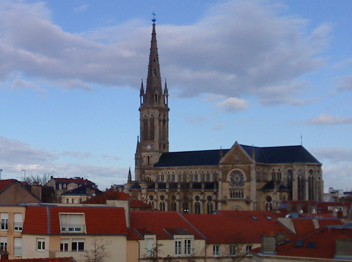 La basilique Notre-Dame-de-Lourdes de Nancy.